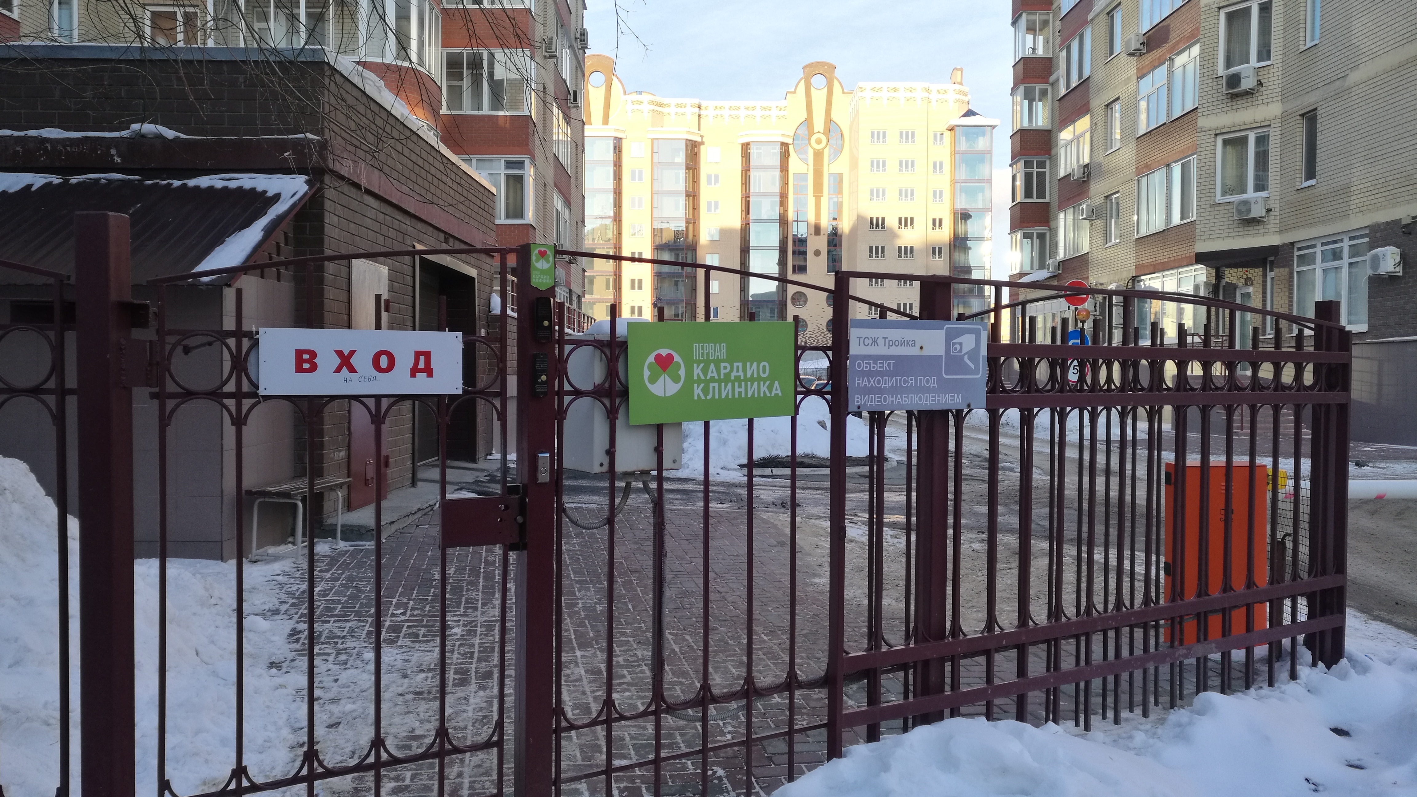 Enirejo de la kloĝejaro "Trojka" en strato Fabriĉnaja. Tjumeno, Rusio.